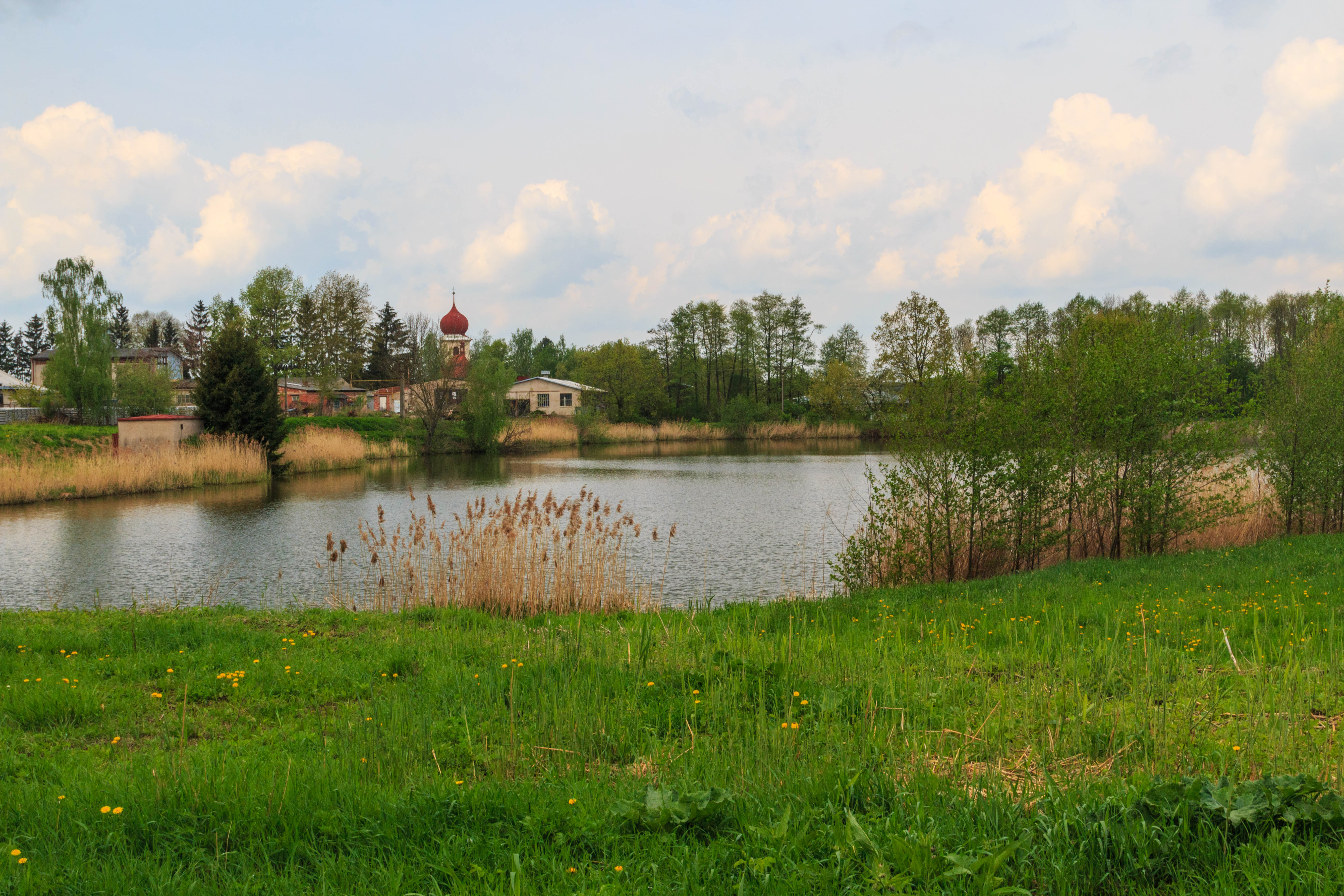 Rybník Rohlíček u Urbanic Project: Vodstvo.